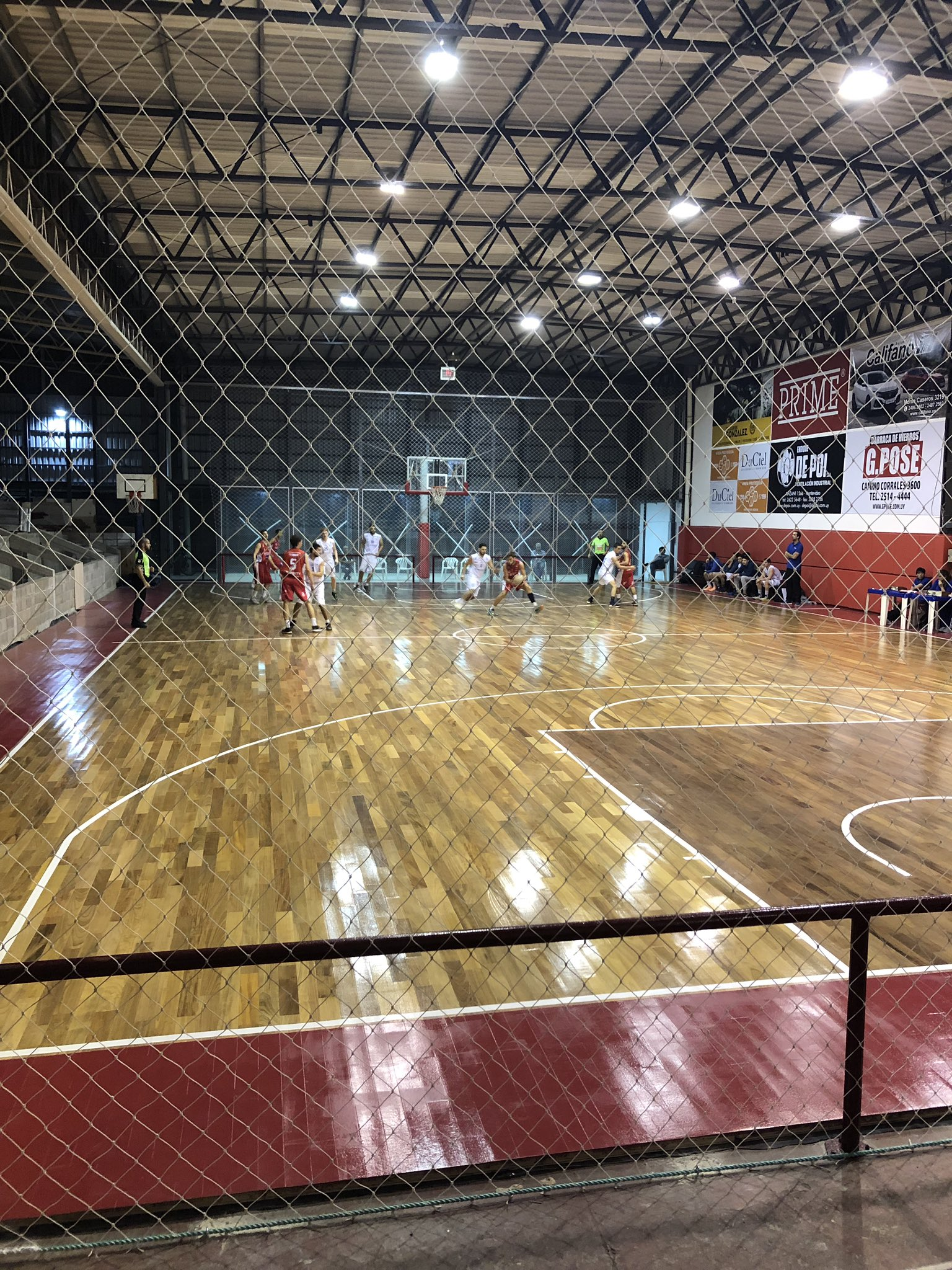 Estadio cubierto Doña Natividad Rivera. Club Social Larrañaga.